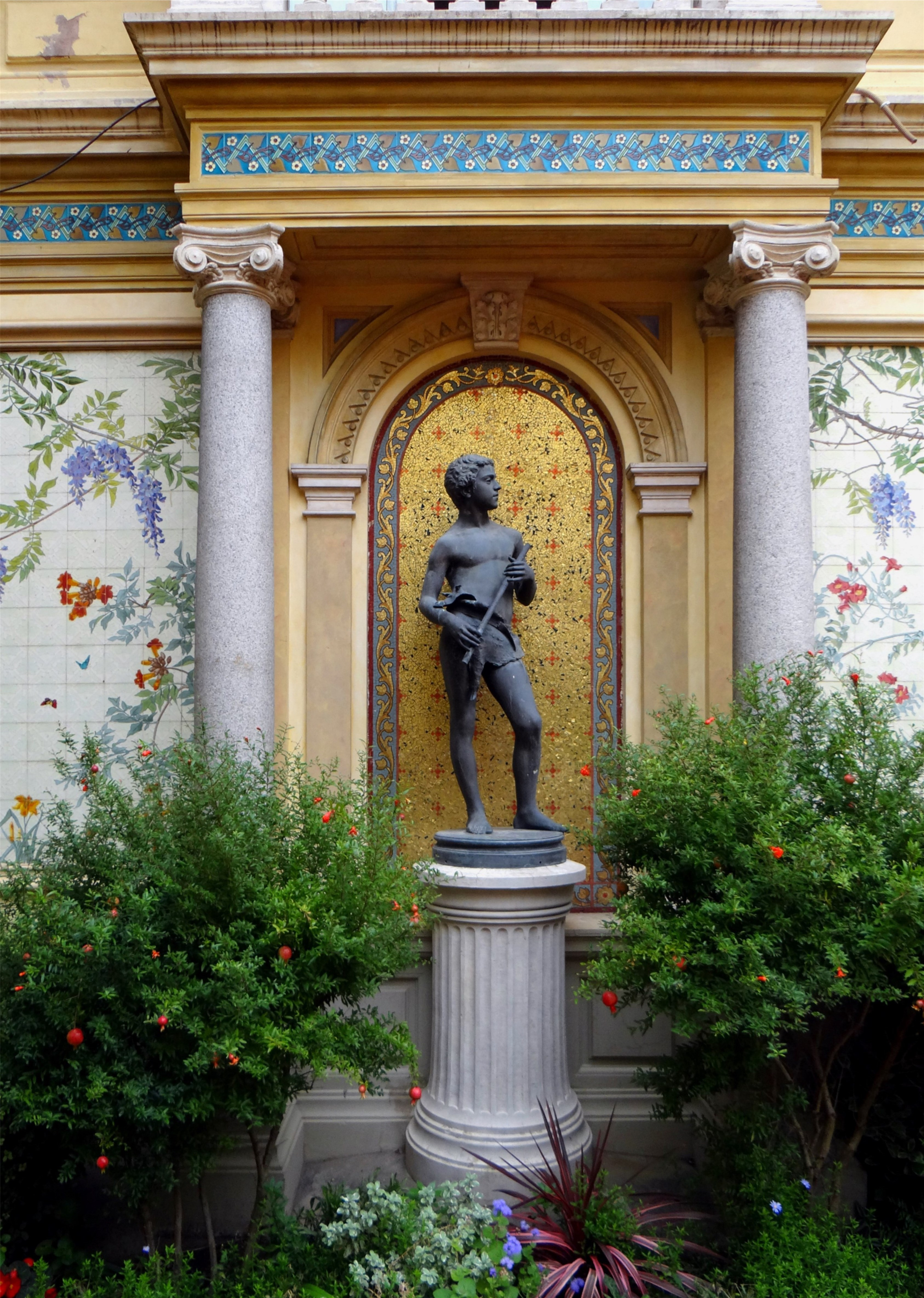 Statue du dieu Pan, Patio, Hôtel Pams, Perpignan, Pyrénées-Orientales, France. This building is en partie classé, en partie inscrit au titre des Monuments Historiques.